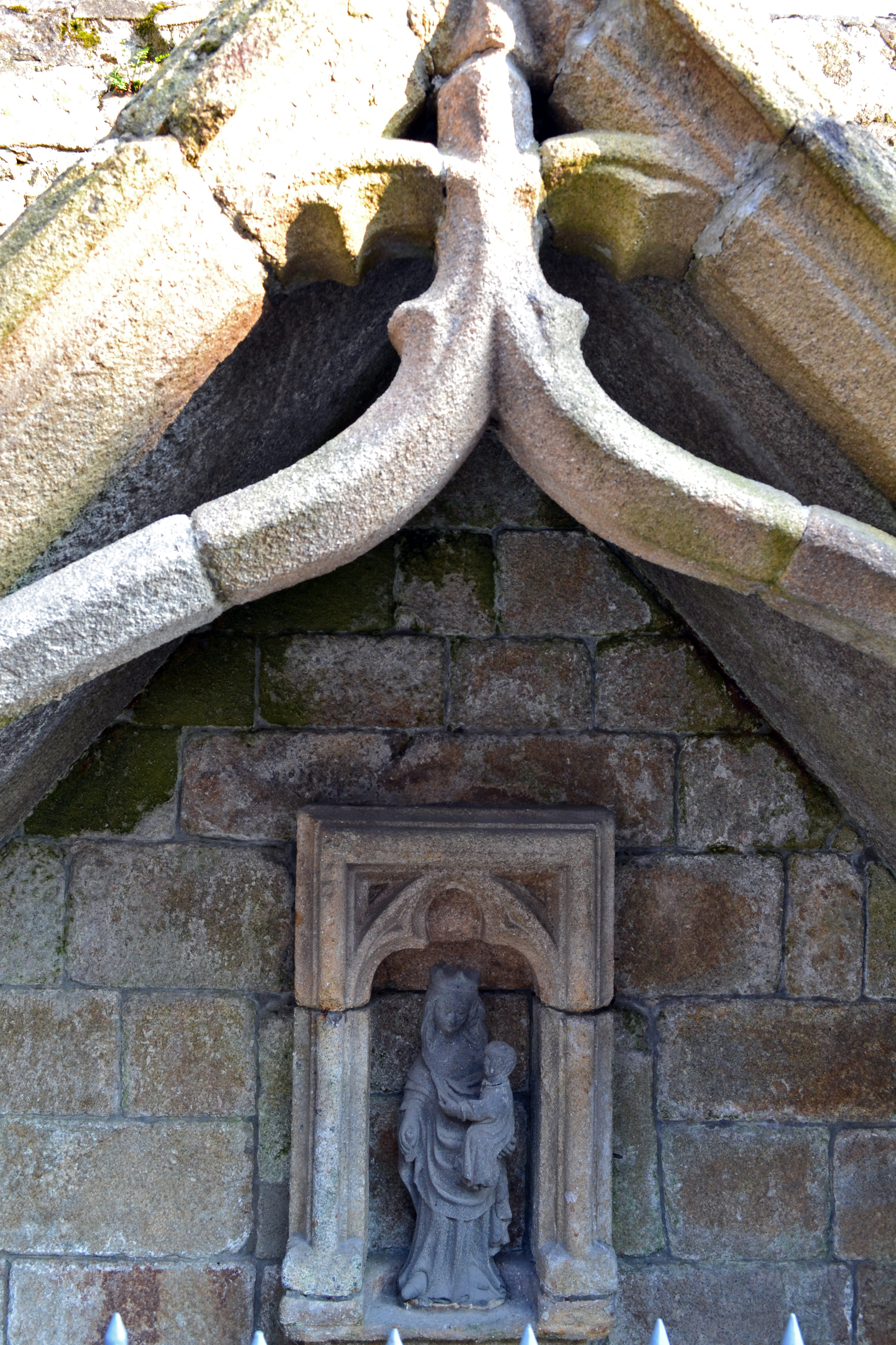 Fontaine de la Gloire et sa Vierge à l'Enfant à Saint-Pol-de-Léon.